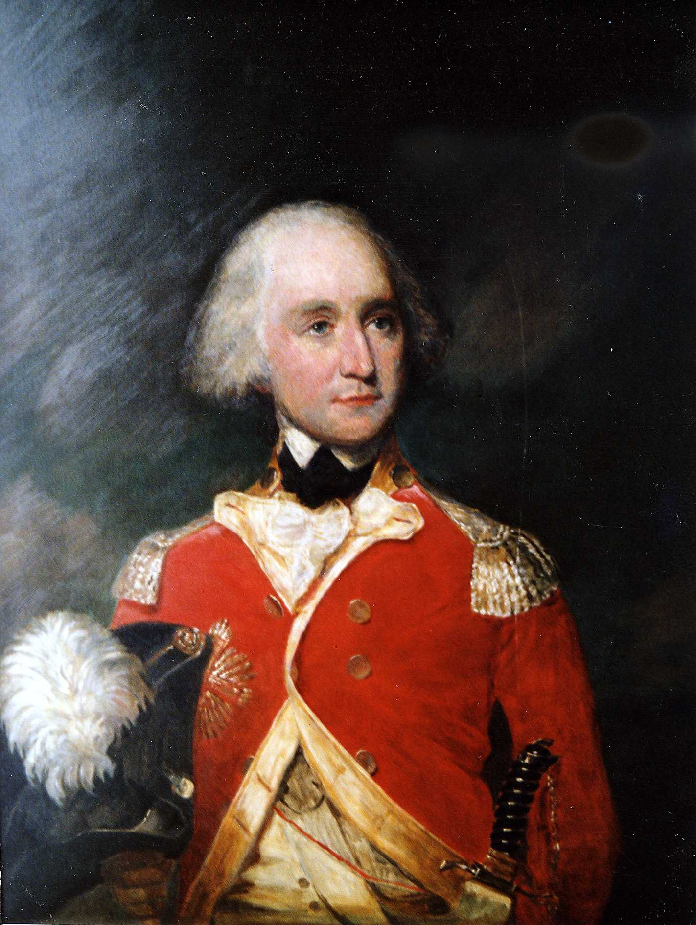 Peter Anker deltok på notabelmøtet 16. feb 1814, sammen med broren Carsten (eier av Eidsvoll Verk) og fetteren Peder Anker. Peter Anker var generalguvernør i den danske kolonien Trankebar i India, 1788-1807. Grått hår, rød uniform m/epåletter i sølv. Holder en tosnutet hatt m/fjær i høyre hånd. Uniformen er generalsuniform fra Trankebar, 1801.